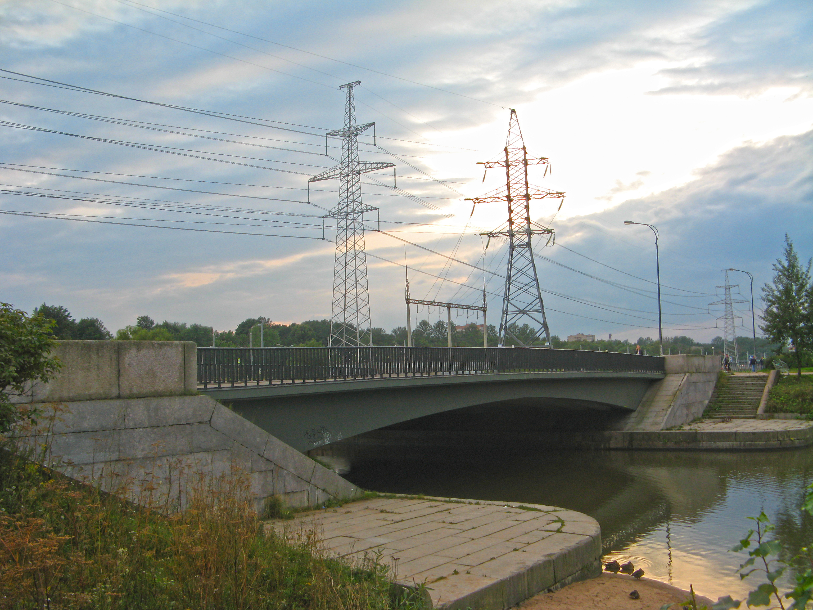 2-й Петергофский мост, Санкт-Петербкрг